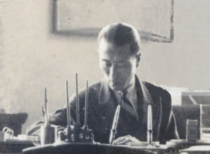 在杭州笕桥中央飞机制造厂的王助